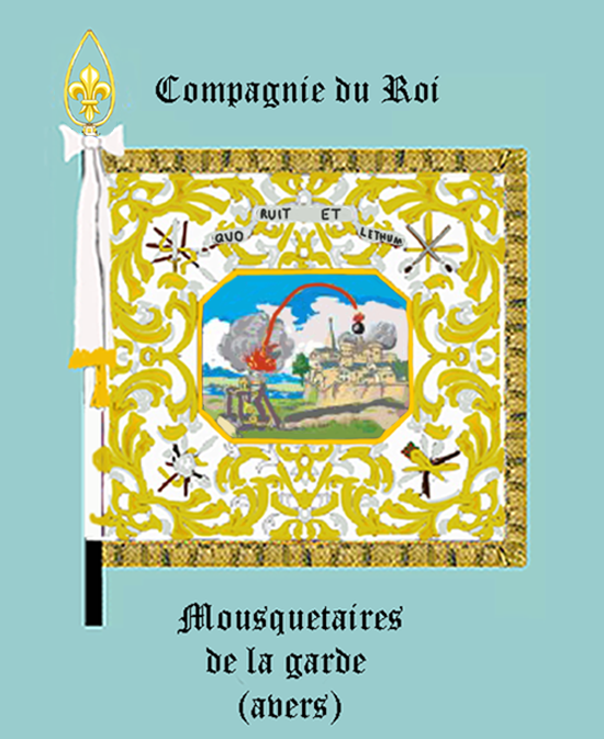 Standarte der Kompanie des Königs/1. Kompanie der Musketiere der Garde (Frankreich)